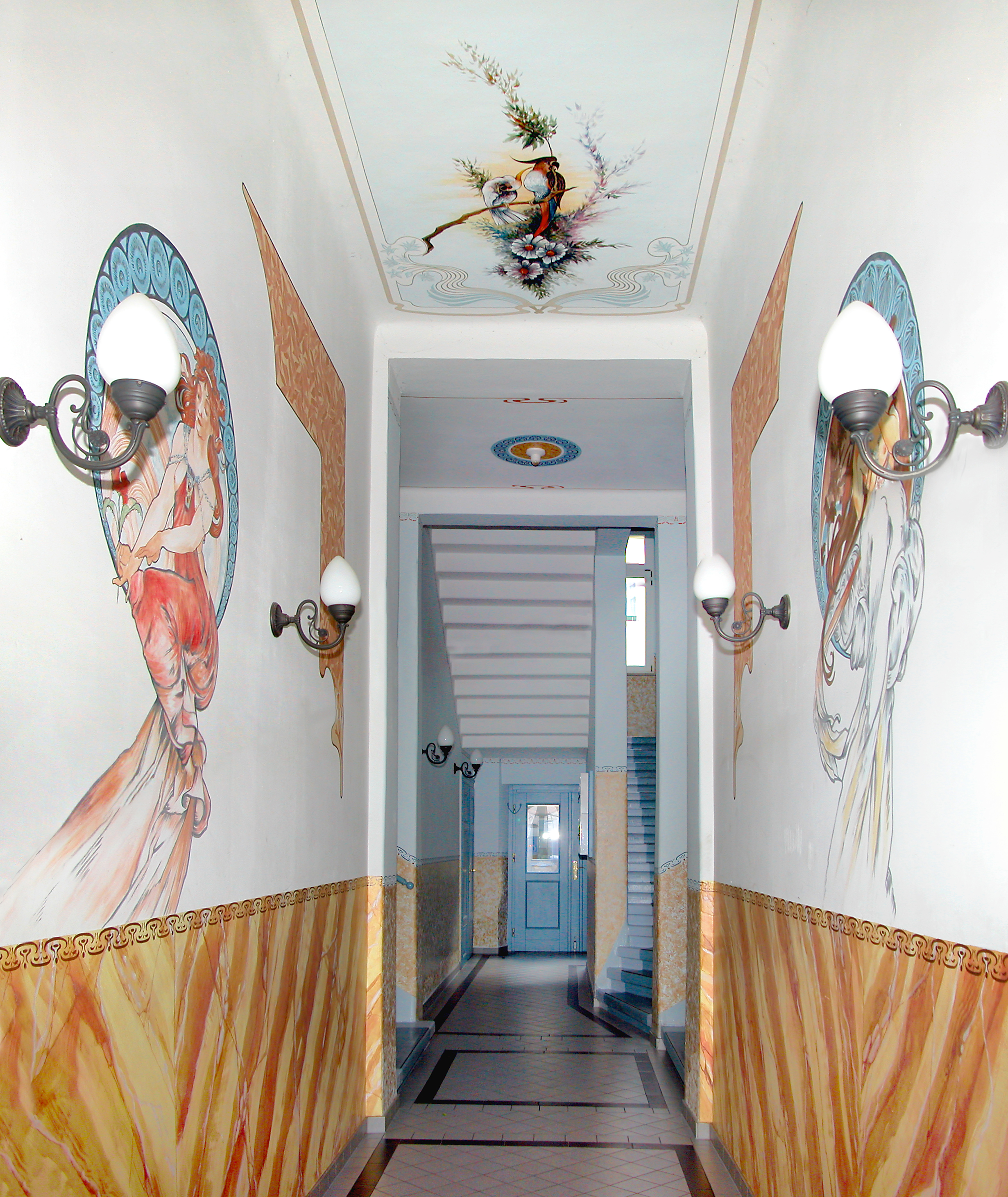 13.10.2007 01139 Dresden-Trachau, Alttrachau 10: Gründerzeit Mietshaus (1902), Entree. [DSCN30530-30531.TIF]20071013105MDR.JPG(c)Blobelt